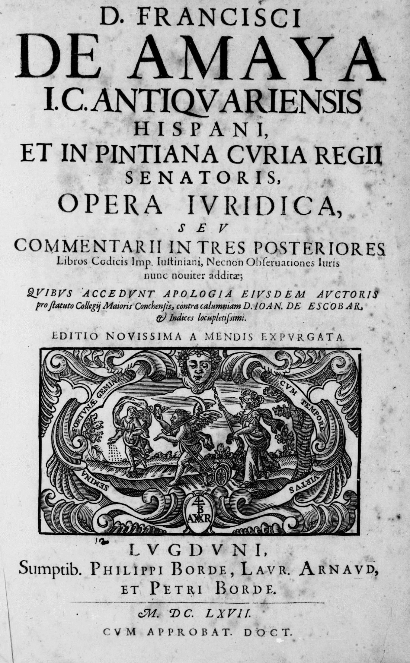 Frontespizio